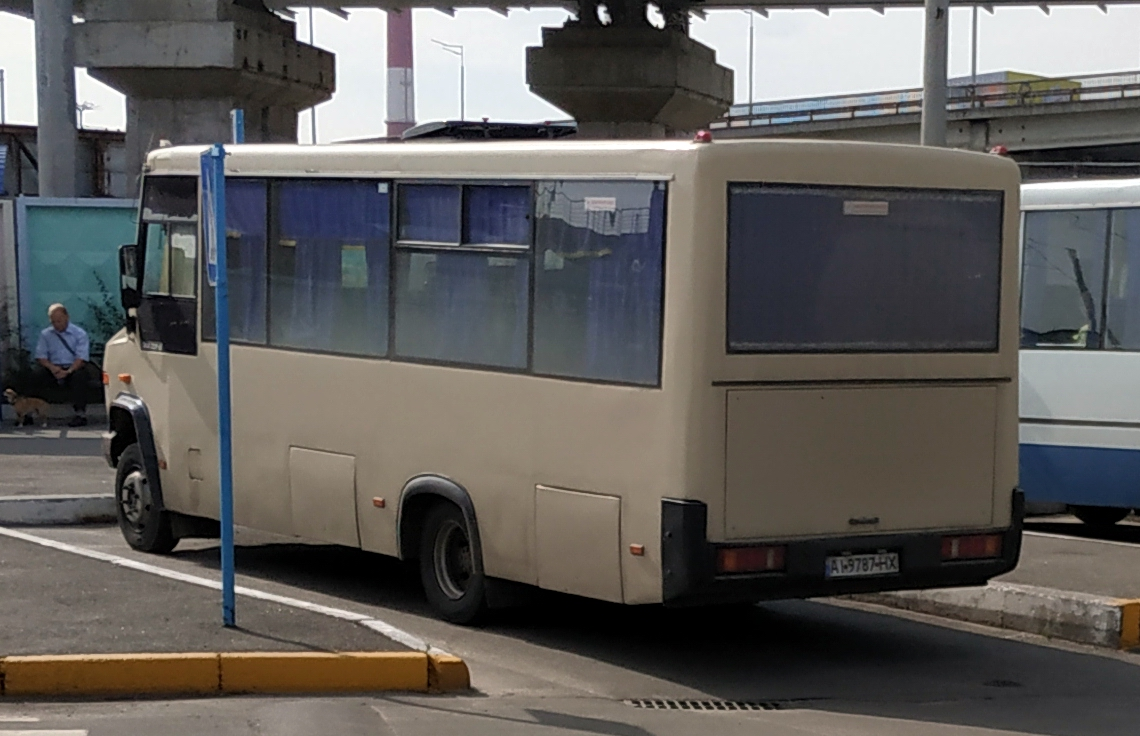 Автобус ГалАЗ-3209.63, Киев, автостанция Выдубичи, 2019 г.